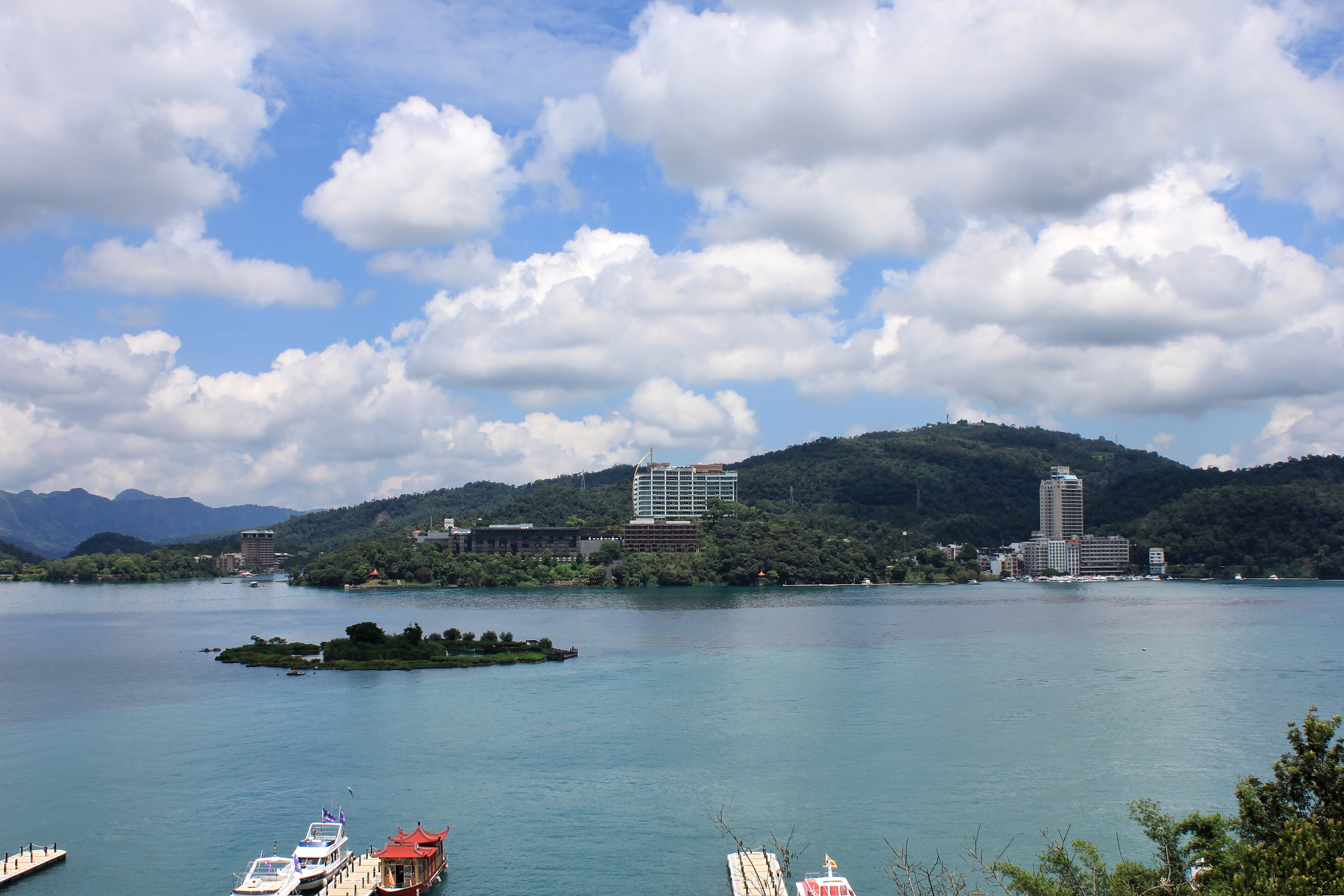 Xuanguang Temple Pier 玄光寺碼頭